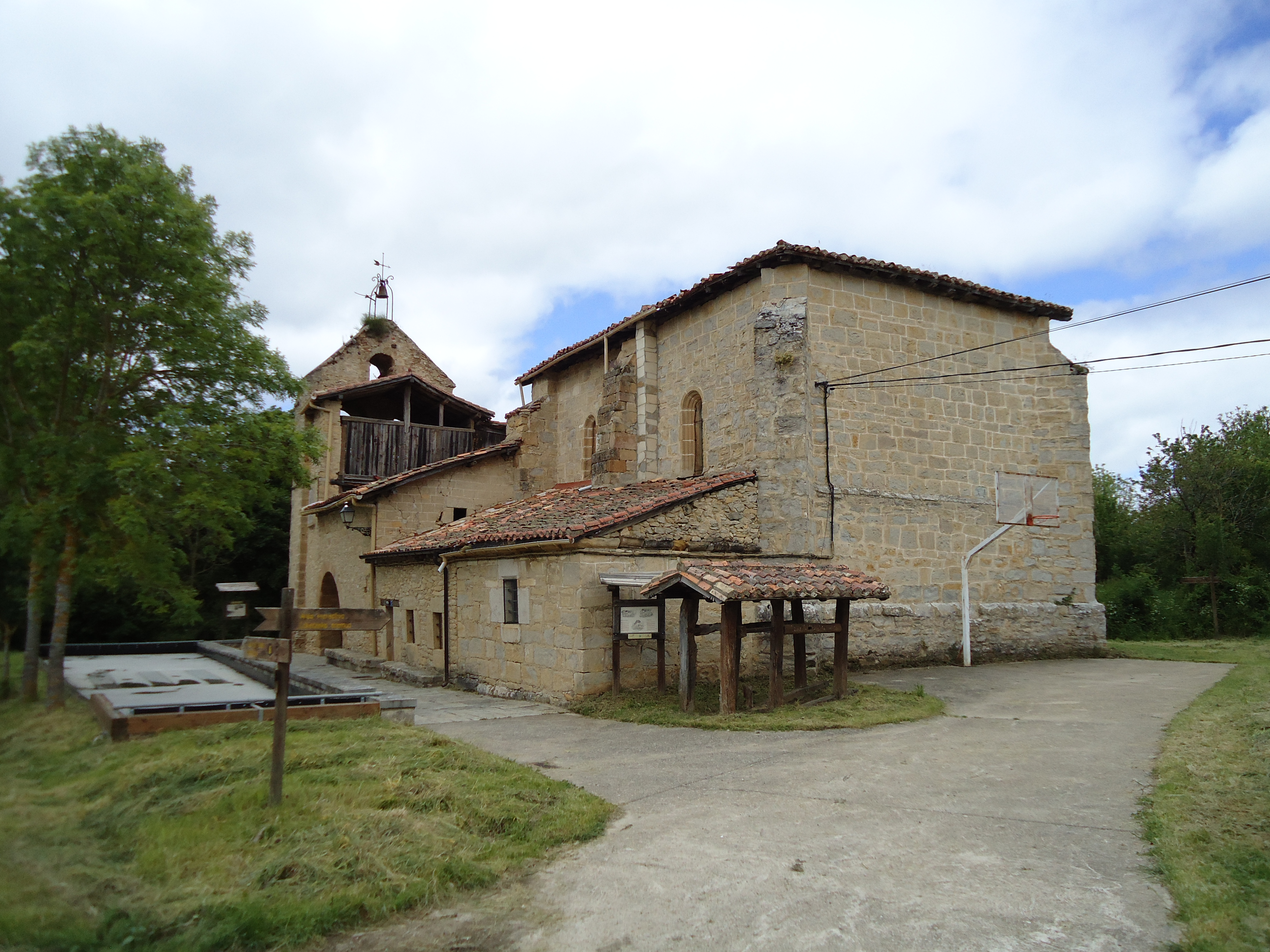 Lalastrako eliza